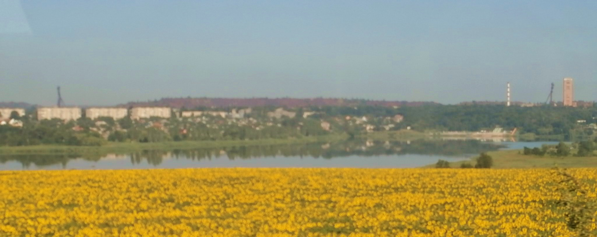 Saksahan im Norden von Krywyj Rih